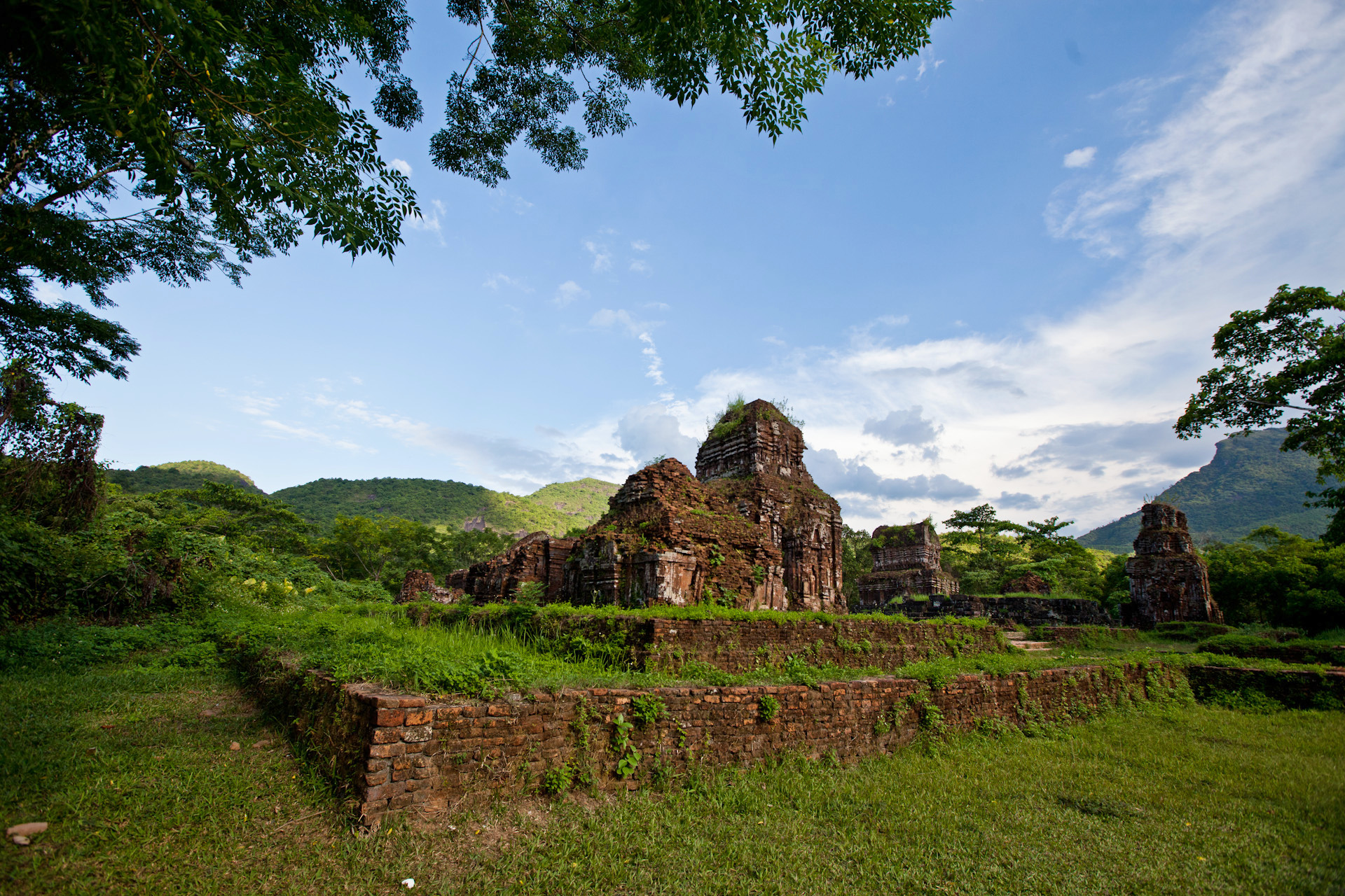 美山圣地 千年的召唤